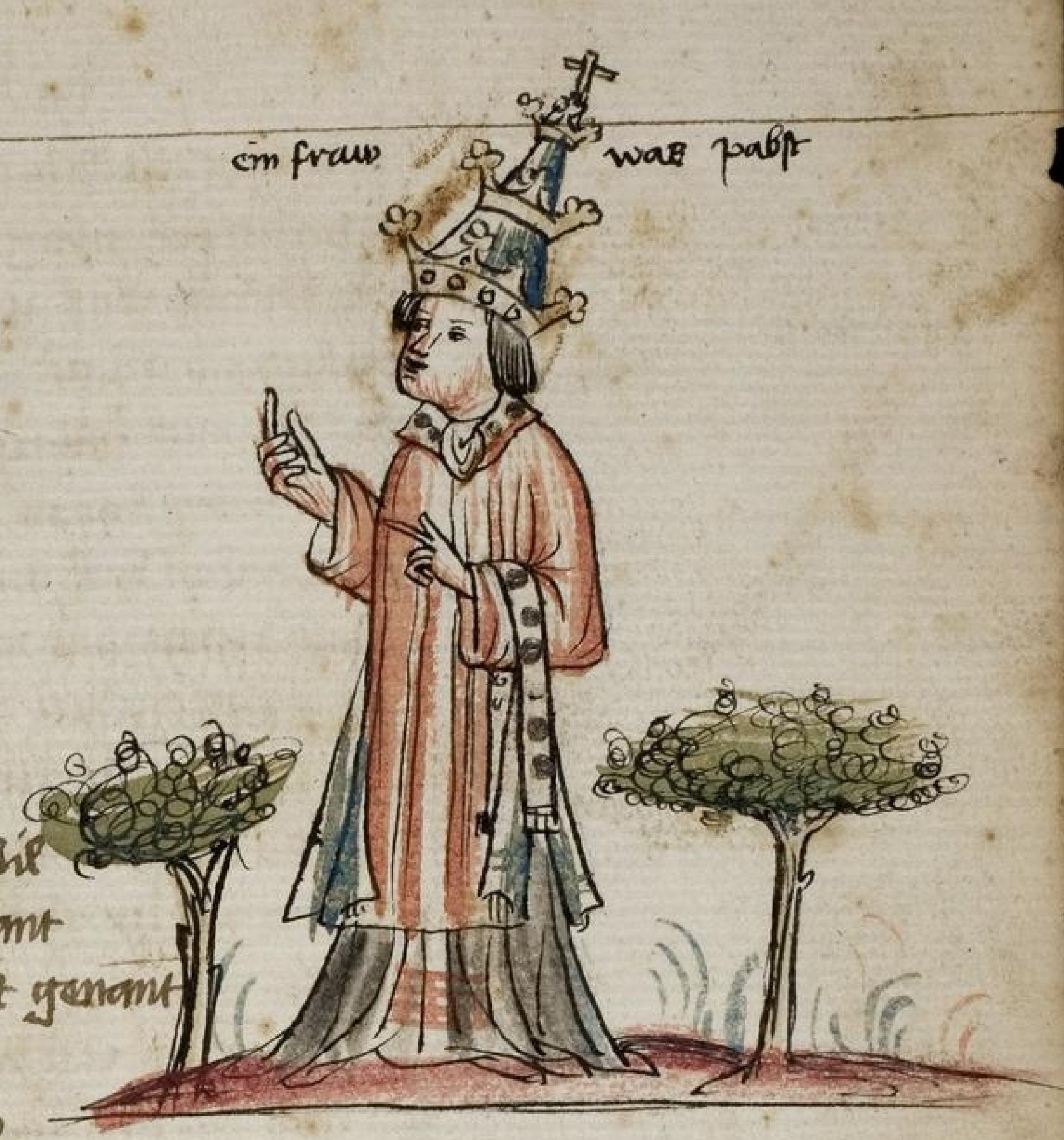 Legende um die Päpstin Johanna in der Weltchronik des Jan Enenkel (Jans der Enikel); Passau (?), um 1420, Seite: 203r. Cod. Pal. germ. 336